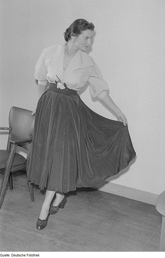 Original image description from the Deutsche FotothekEine Frau posiert mit Bluse und Rock bei der "Internationalen Messemodenschau", Herbstmesse 1953